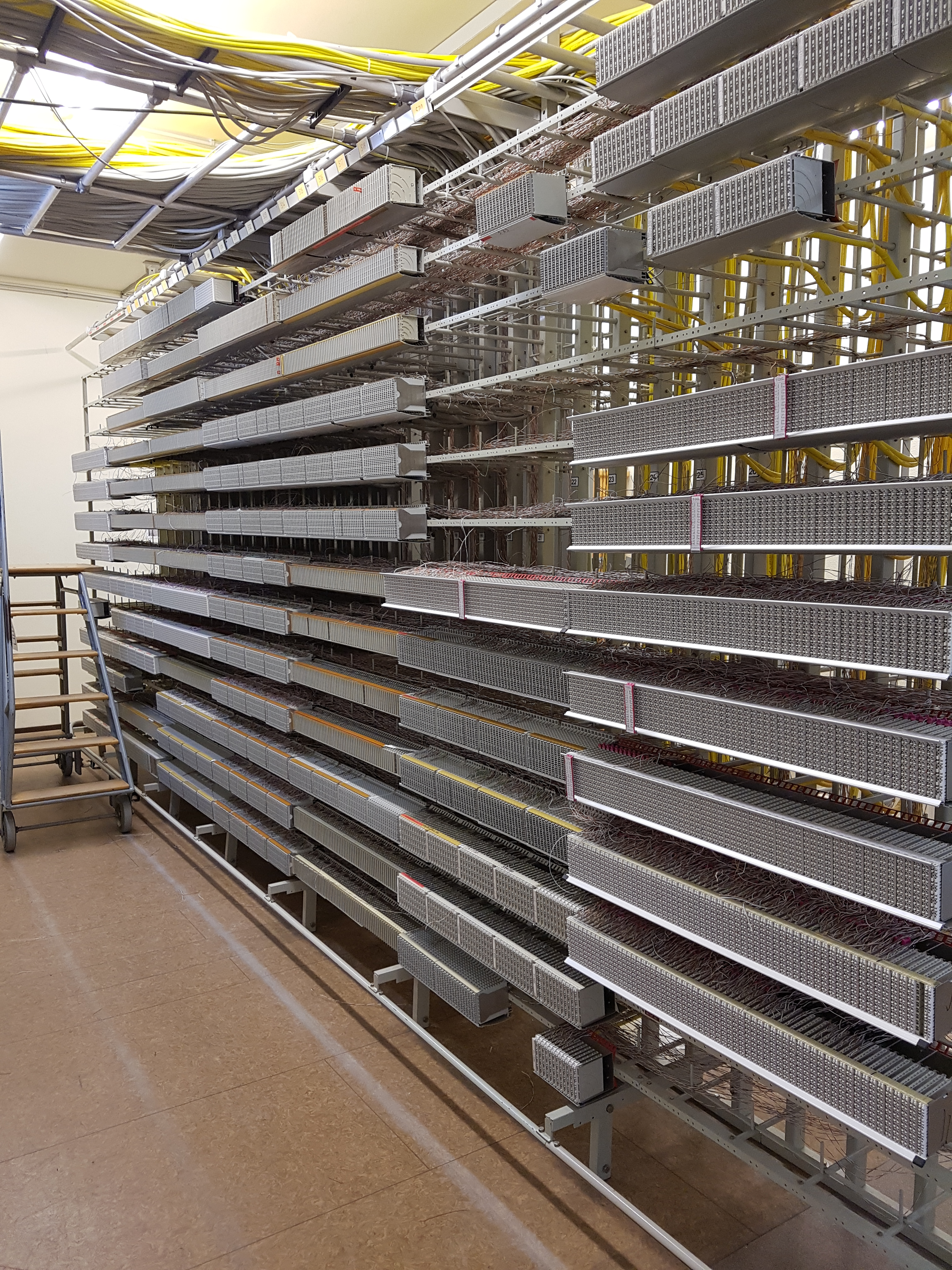 Eine wagerechte Reihe im HVT